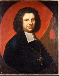 Friedrich Christian von Plettenberg (1644-1705) Fürstbischof von Münster